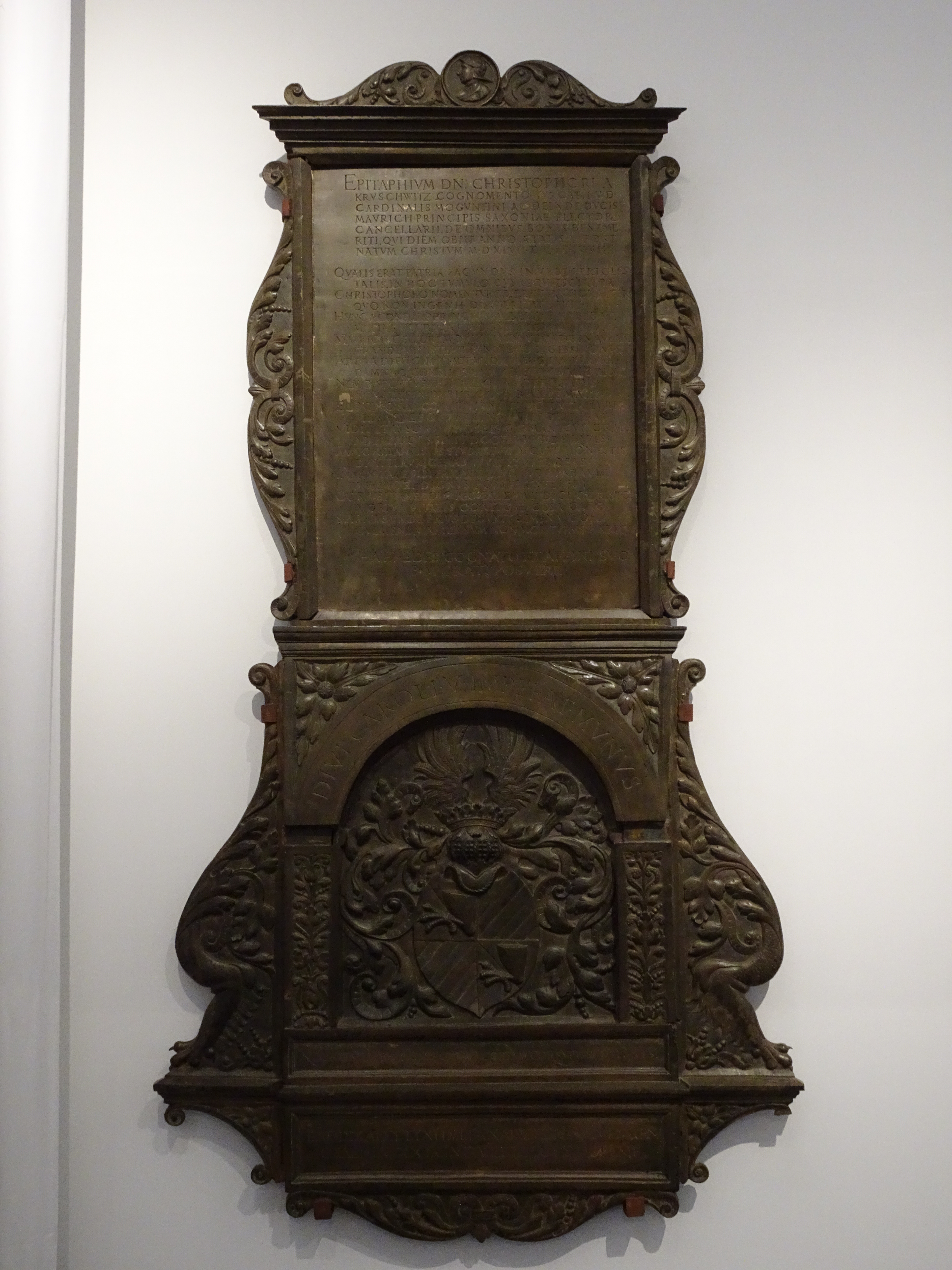 Epitaphs für Christoph "Türk" von Kruschwitz in der Universitätskirche St. Pauli zu Leipzig